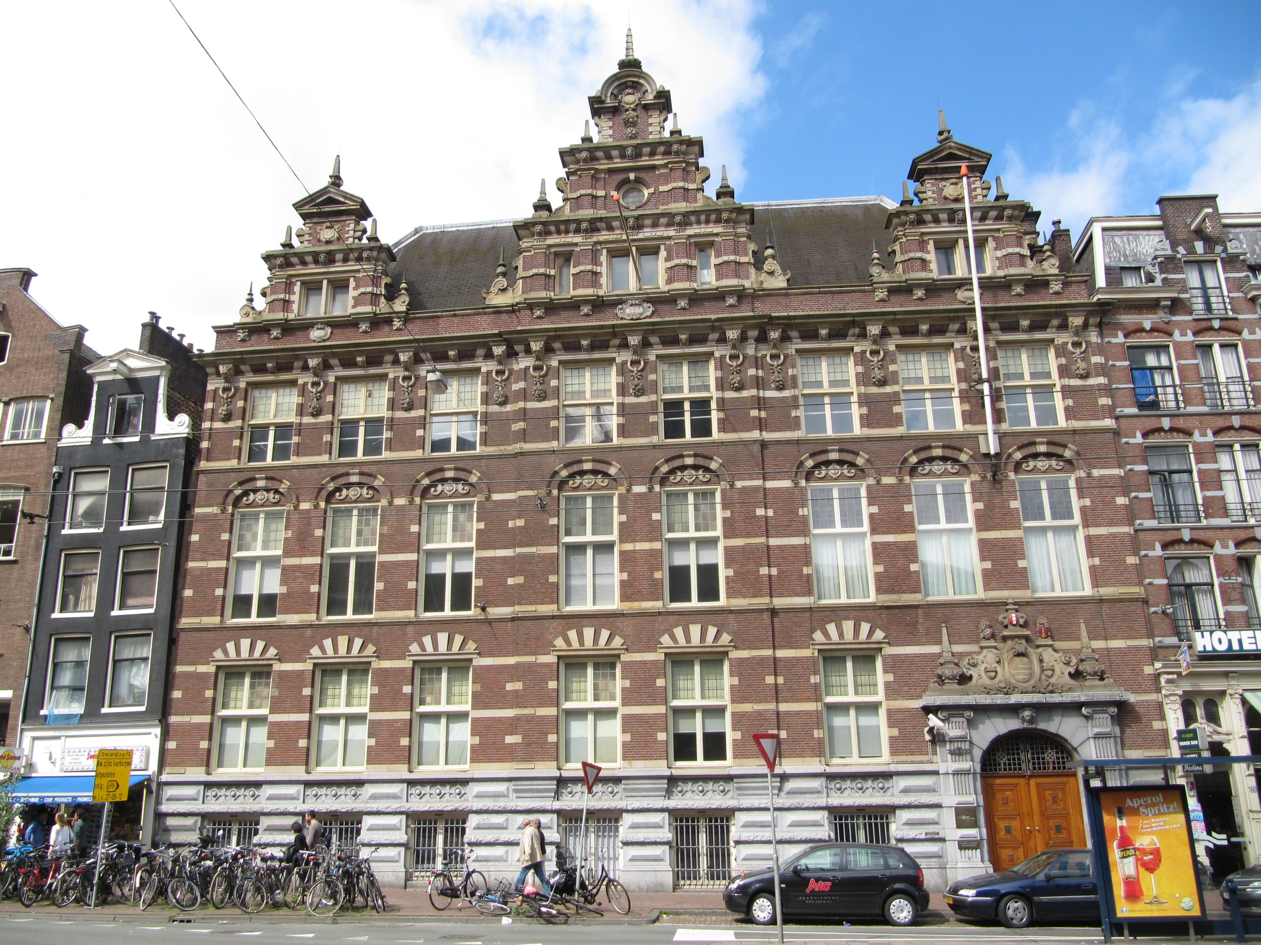 RM518445 Amsterdam - Nieuwezijds Voorburgwal 162.jpg. Hier was gevestigd Handelsvereniging Amsterdam